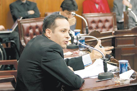 Senador Alexander López Maya en debate sobre la reforma a la Educación Superior en Colombia